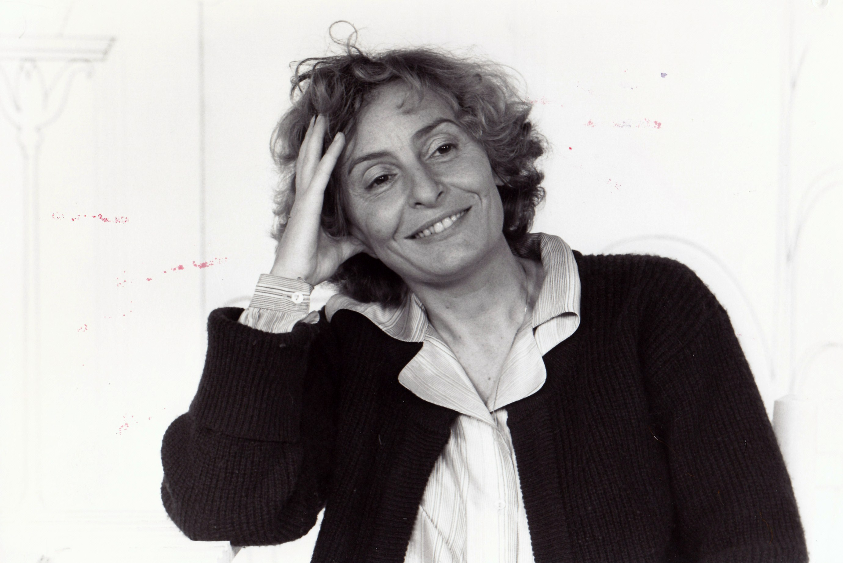 Simone